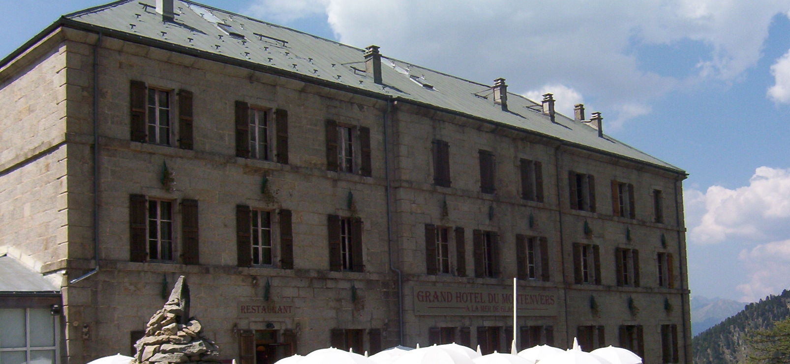 Grand Hotel Du Montenvers am Gletscher Mer de Glace bei Chamonix-Mont-Blanc in Frankreich